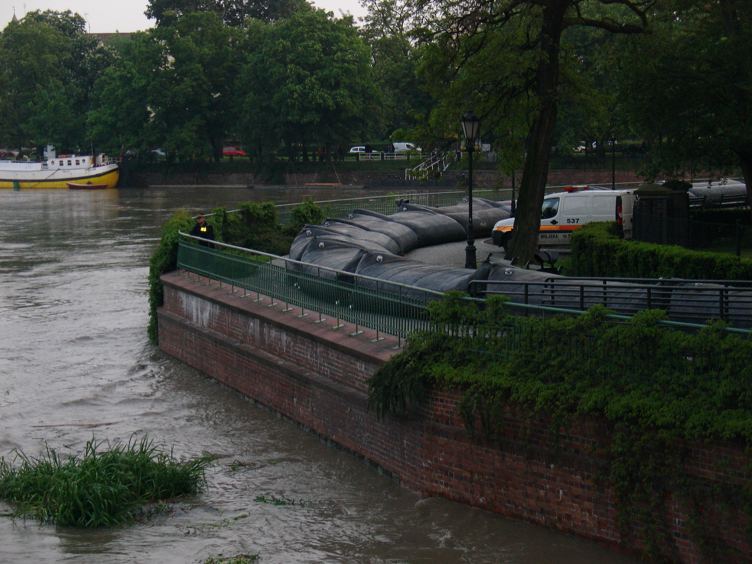 Wyspa Piaskowa we Wrocławiu, piątek 21-05-2010, wieczór. Przenośne umocnienia wyspy z zapór wypełnionych wodą